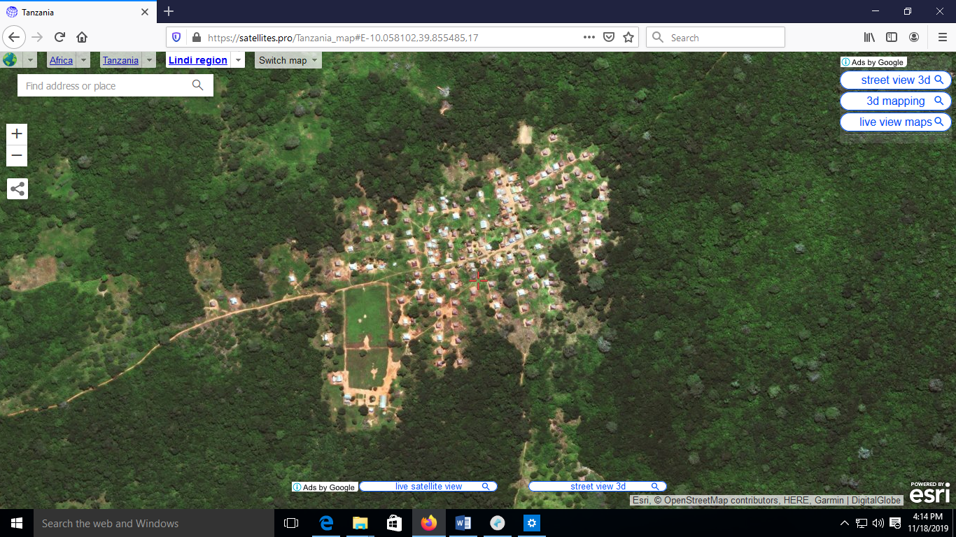 Kiswahili: ramani